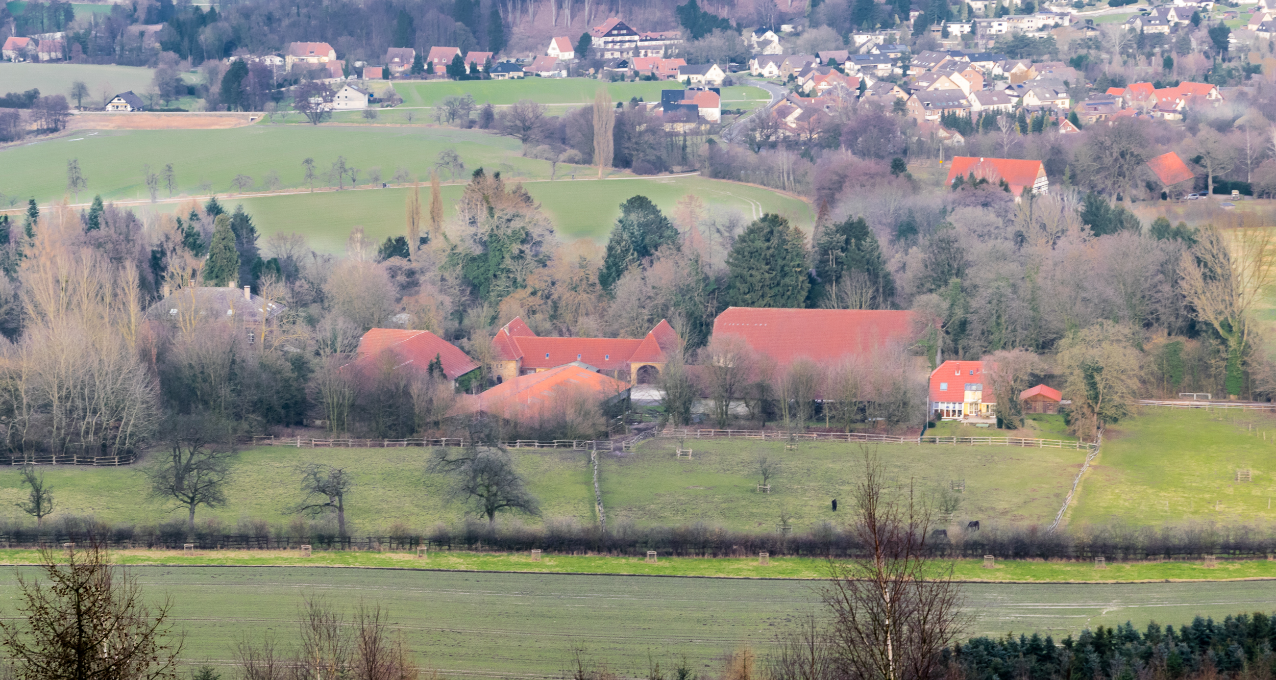 Gut Wistinghausen, Ansicht vom Tönsberg